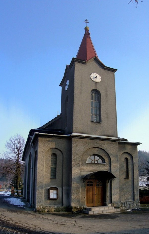 Myslík-kaple Panny Marie sedmibolestné